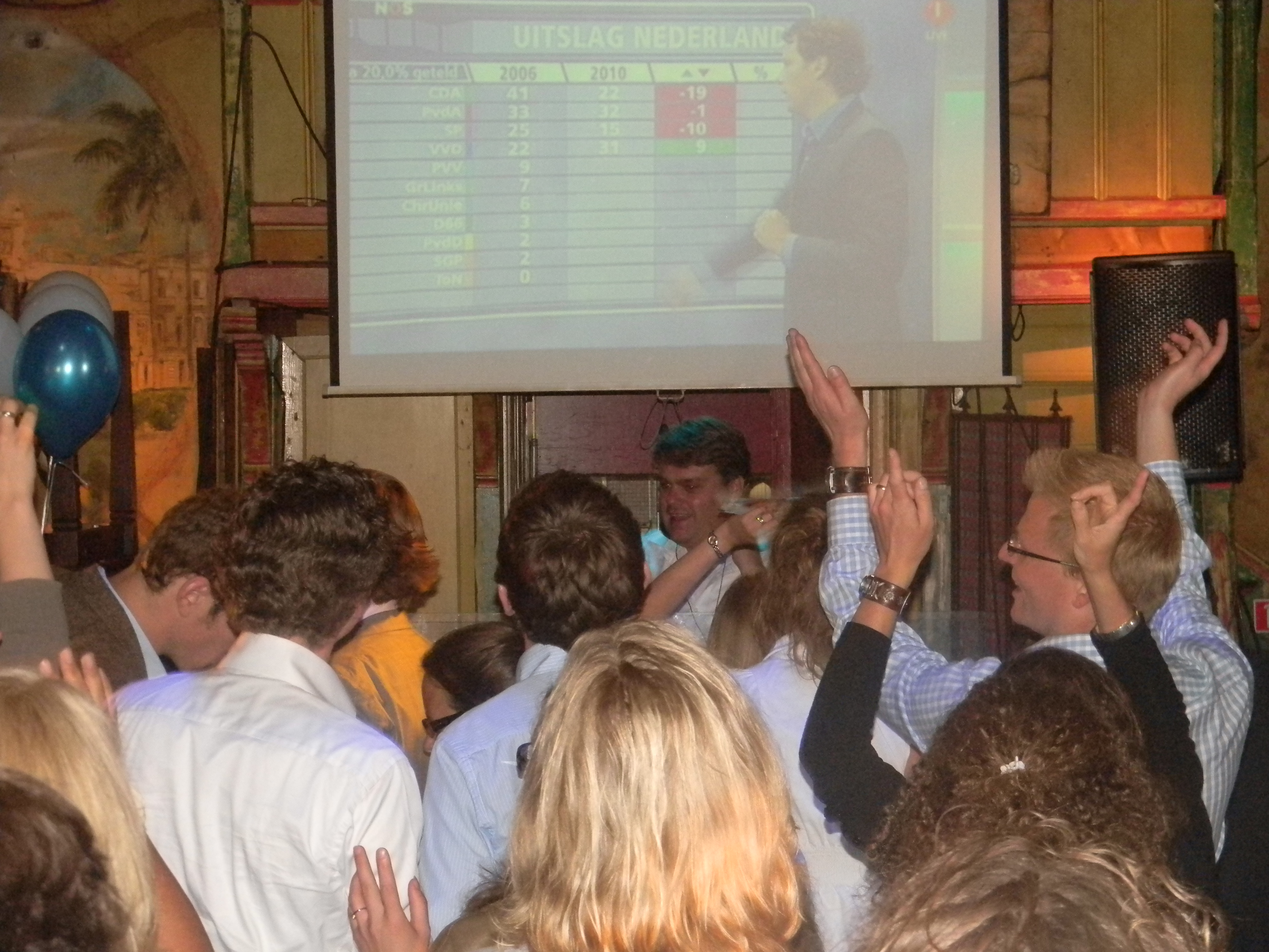 Ed Anker als dj tijdens de verkiezingsavond van de ChristenUnie voor de Tweede Kamerverkiezingen in 2010 in café Havana in Den Haag. Anker verloor zijn zetel bij deze verkiezingen.